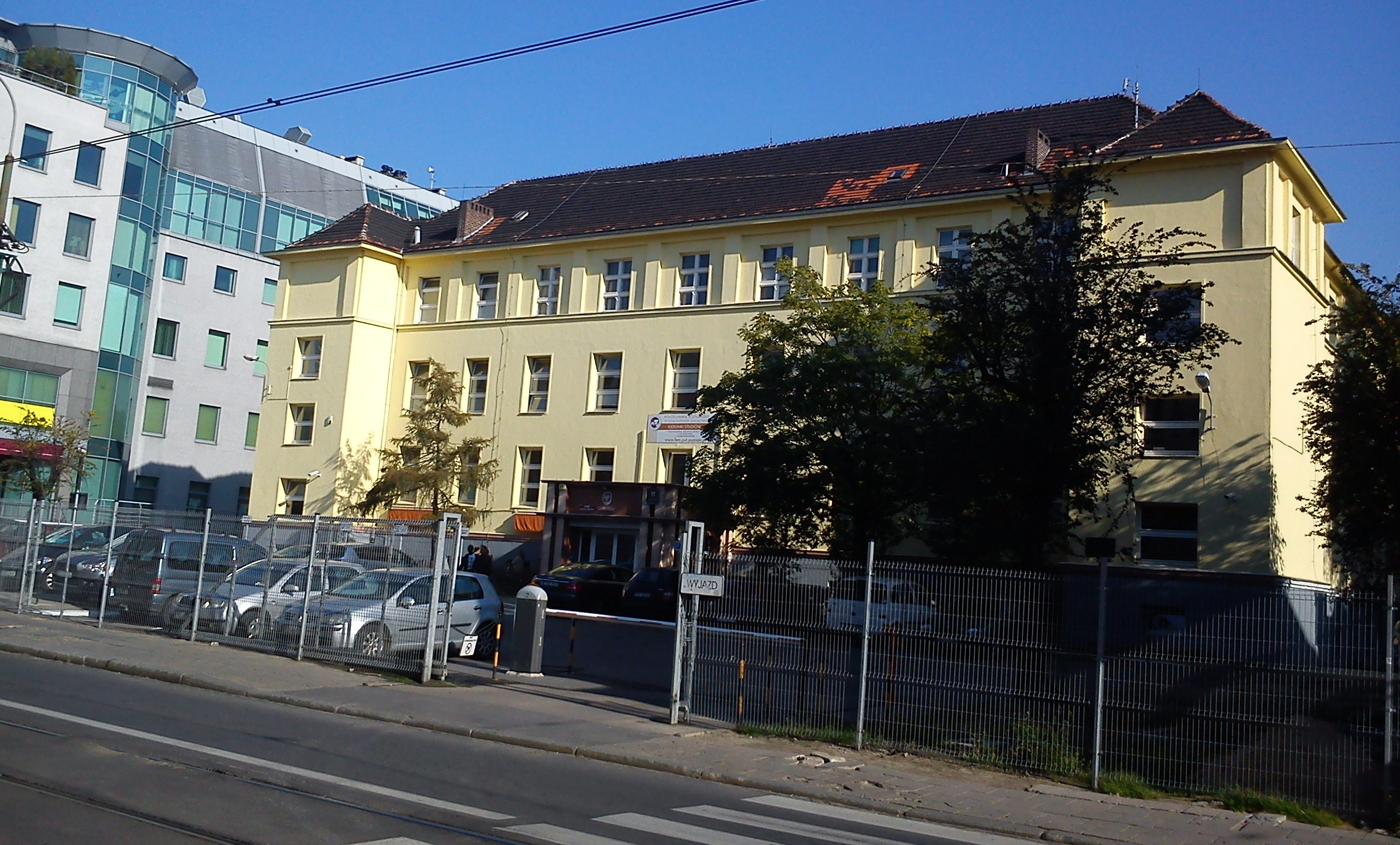 Dawna Miejska Szkoła Realna w Poznaniu (obecnie Politechnika).